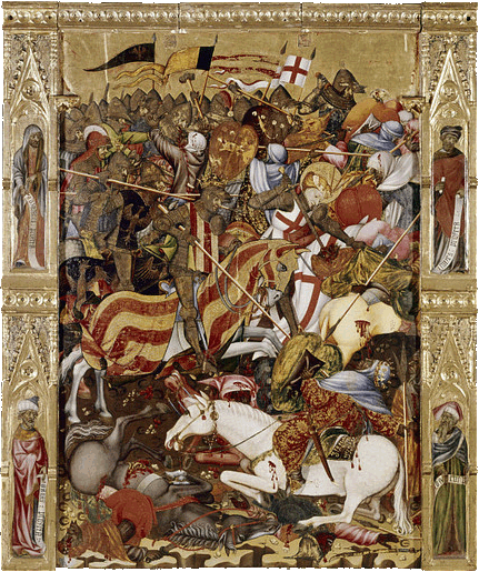 Reproducción del cuadro atribuido a Andrés Marçal de Sax de la Batalla del Puig, retablo del Centenar de la Ploma, presente en la Capilla de Valencia dónde tradicionalmente se realizó la primera Misa cristina.